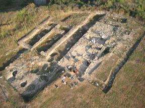 Fotografia aèria de l'àrea ibèrica del jaciment arqueològic de l'Esquerda durant la campanya d'excavació de l'any 2003.